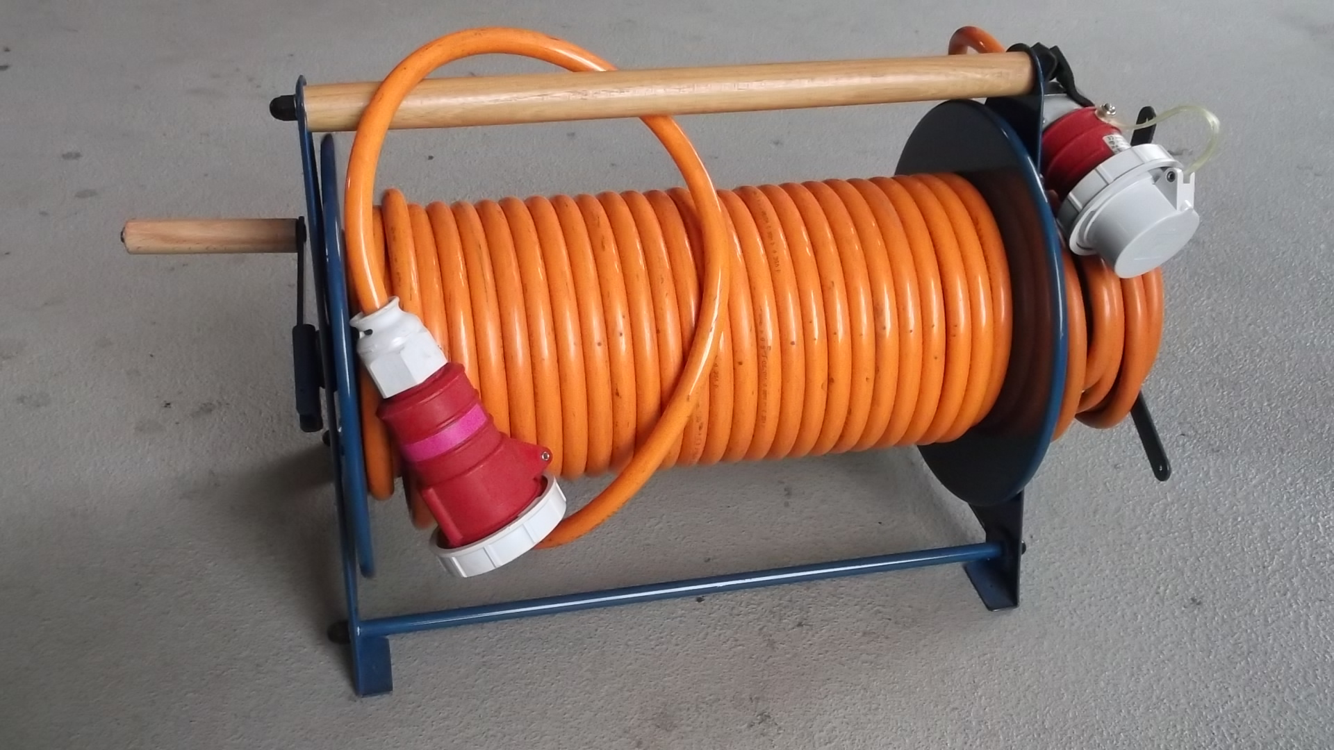 CEE 400V 16A 6h IP67 Drehstromverlängerungsleitung als Leitungstrommel. Durch ein Bajonettsystem mit einer hohen Schutzart für den Außenbereich vorgesehen.